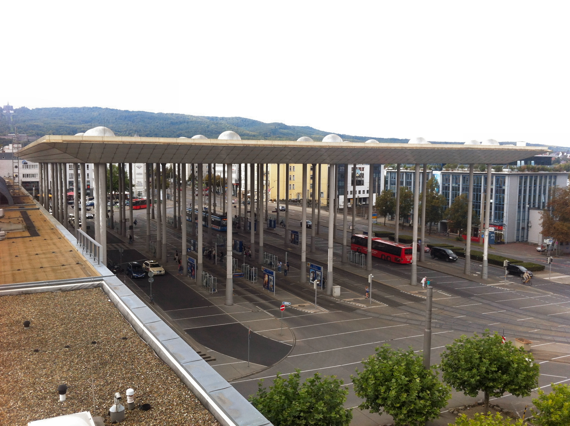 Bahnhof Kassel Wilhelmshöhe